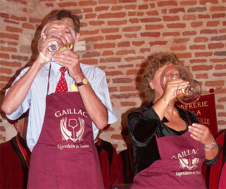 Épreuve du vin, part de la cérémonie de l'inthronisation à l'Ordre de la Dive Bouteille de Gaillac, France